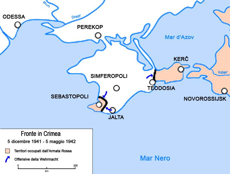 Situácia na polostrove Krym od 5. decembra 1941 do 5. mája 1942